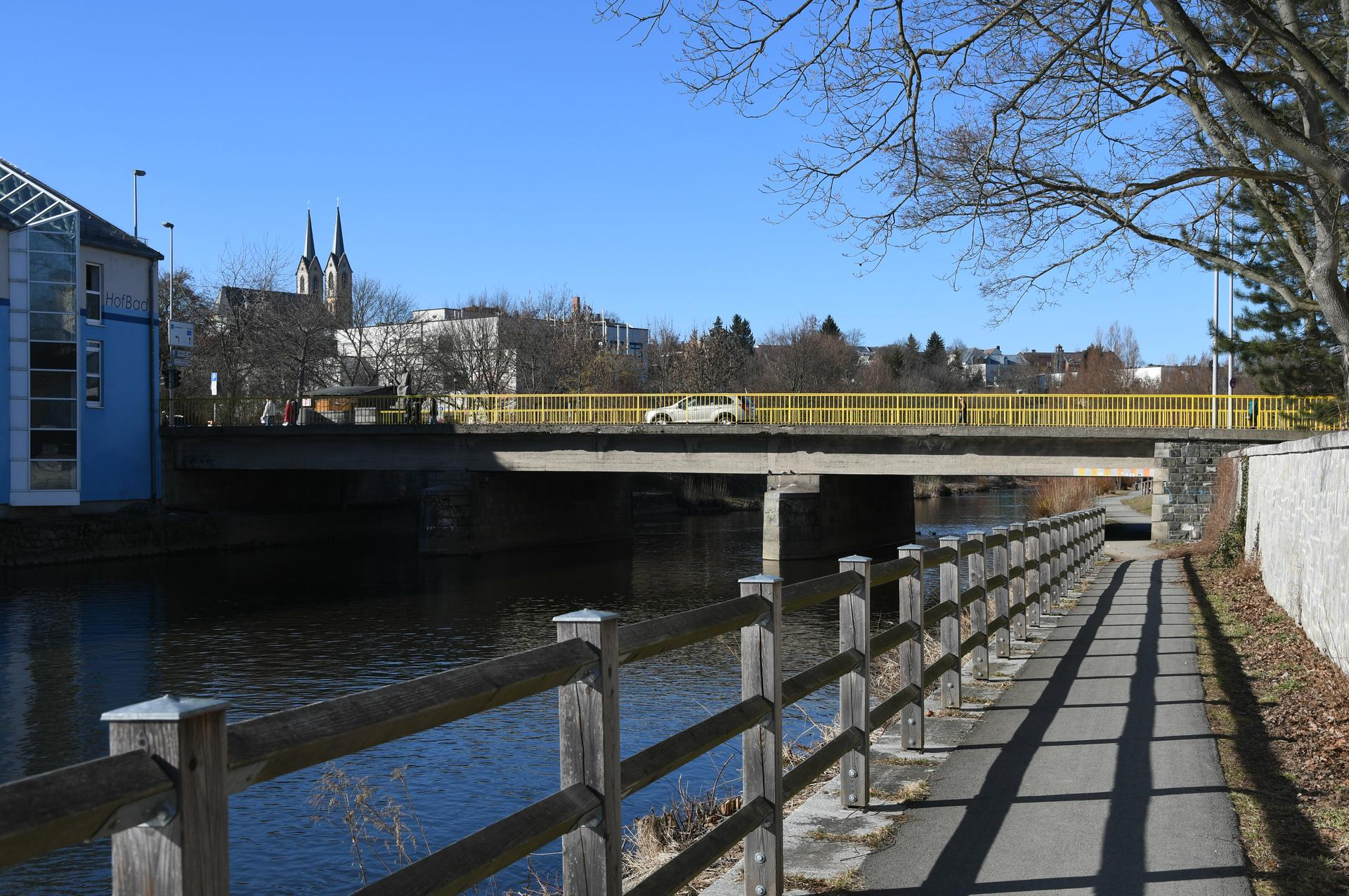 Hof-FriedrichEbertBruecke